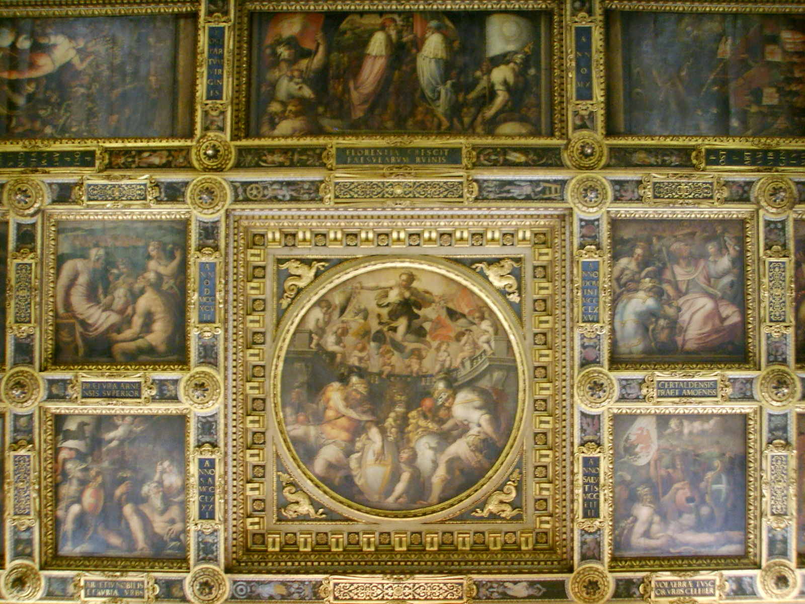 Palazzo vecchio, salone dei 500 soffitto 11 centro